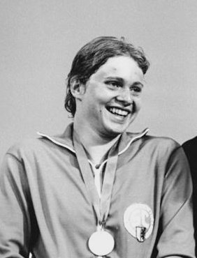 Petra Thümer